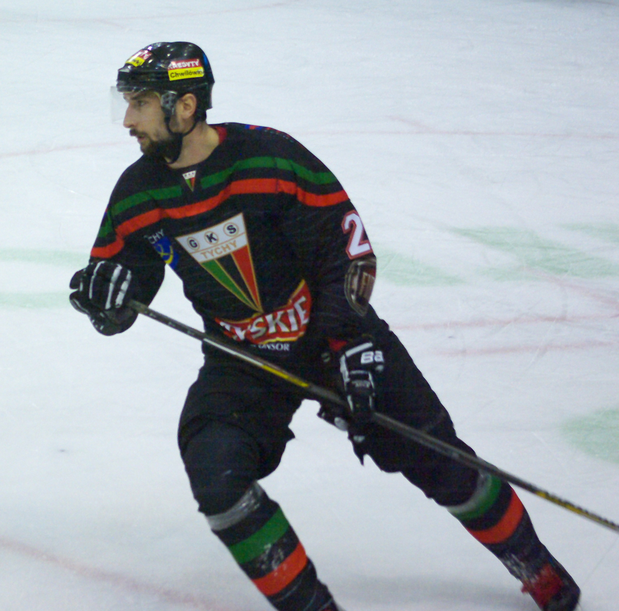 Patryk Kogut w barwach GKS Tychy w meczu przeciw STS Sanok (Arena Sanok, 22 grudnia 2015)